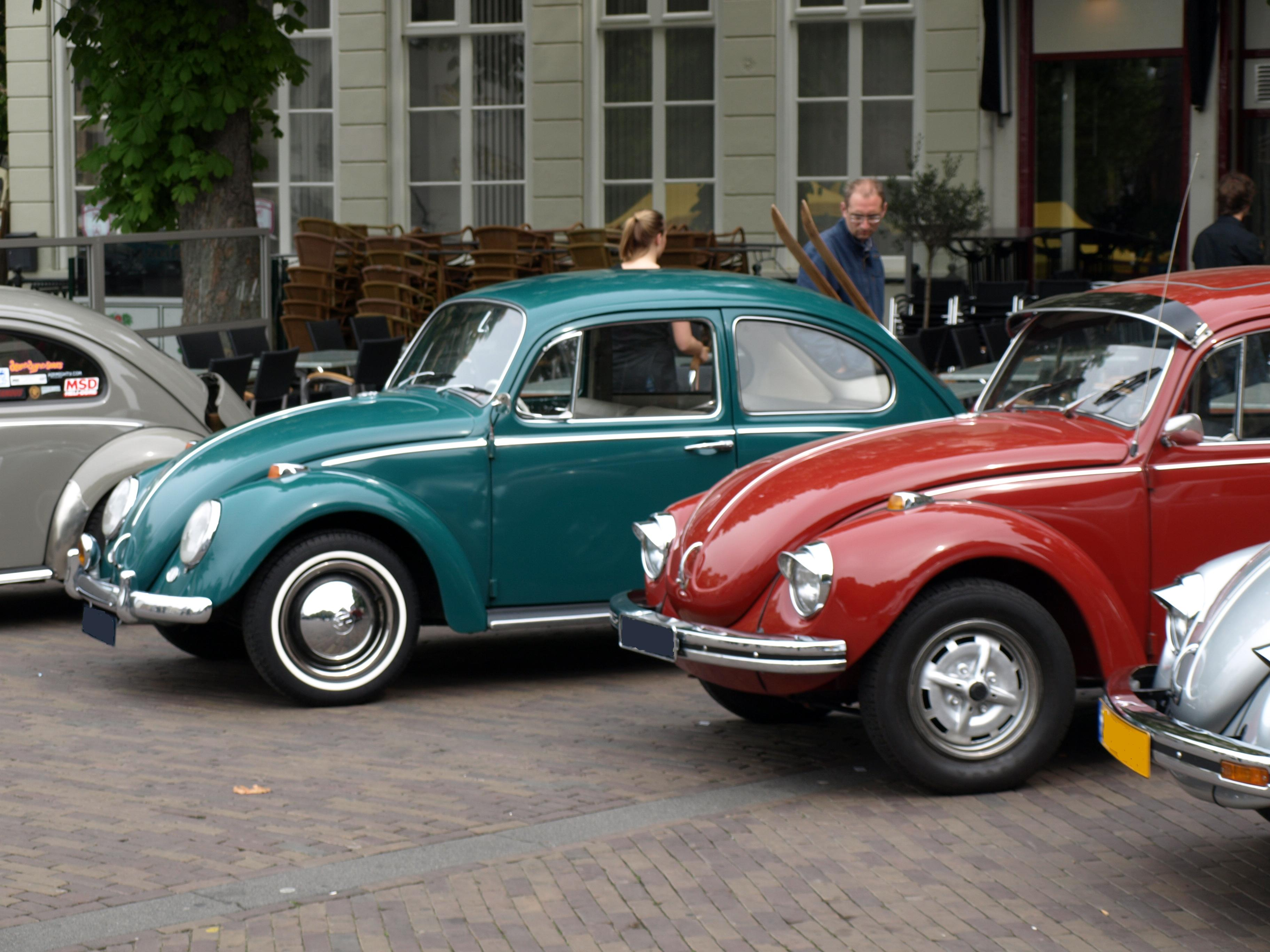 Aircooled Chillout Day 2009 - Deventer